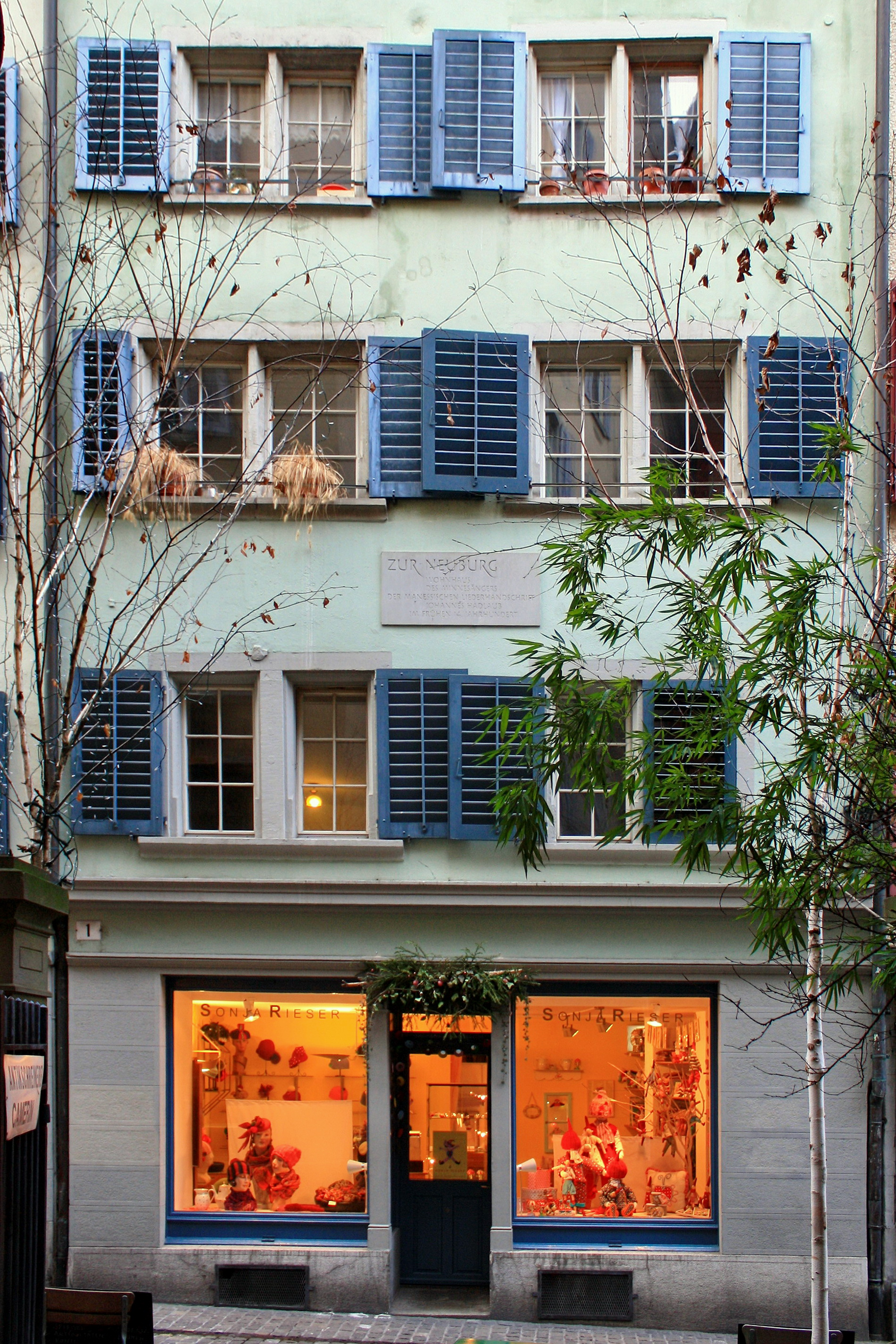 Haus «zur Neuburg» in Zürich-Rathaus quarter (Switzerland)